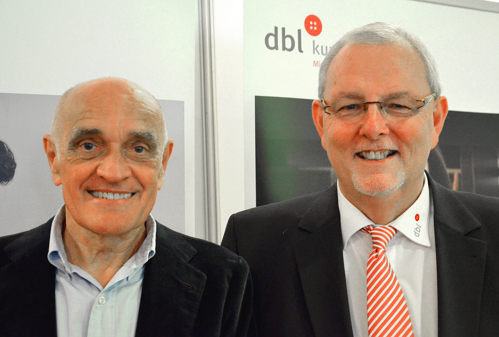 Eröffnung der Wirtschaftsmesse Hannover 2014; Martin Kind, Präsident des Sportvereins Hannover 96. und Bernd Bühmann, Vorstandsvorsitzender des Netzwerkes Pro Hannover Region ...